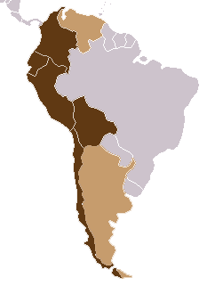 Andenländer